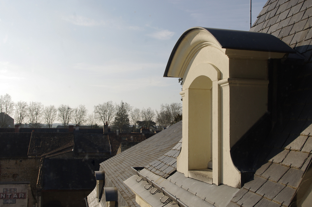 Lucarne d'un hôtel particulier de Richelieu, Indre-et-Loire, France